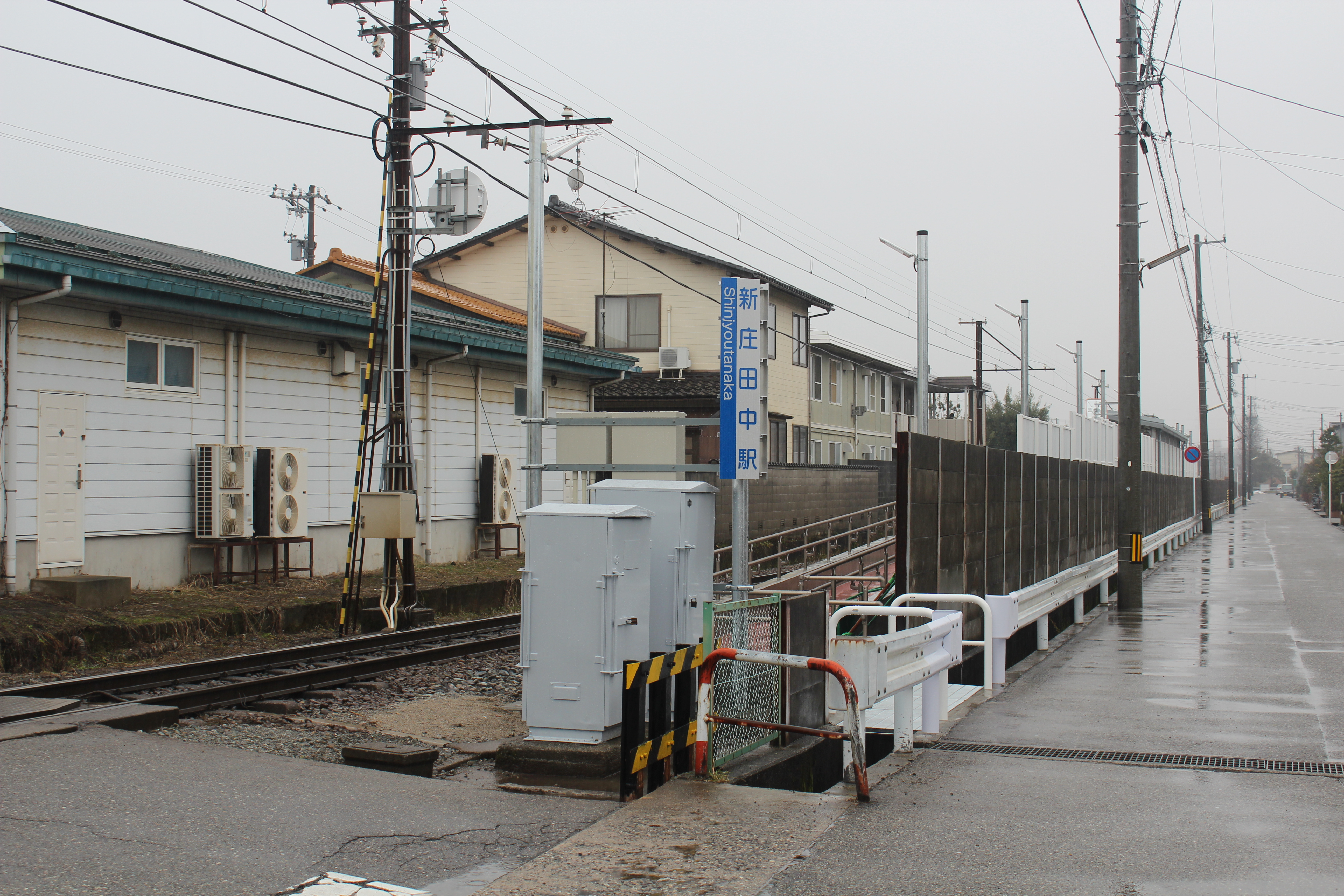 富山地方鉄道 新庄田中駅